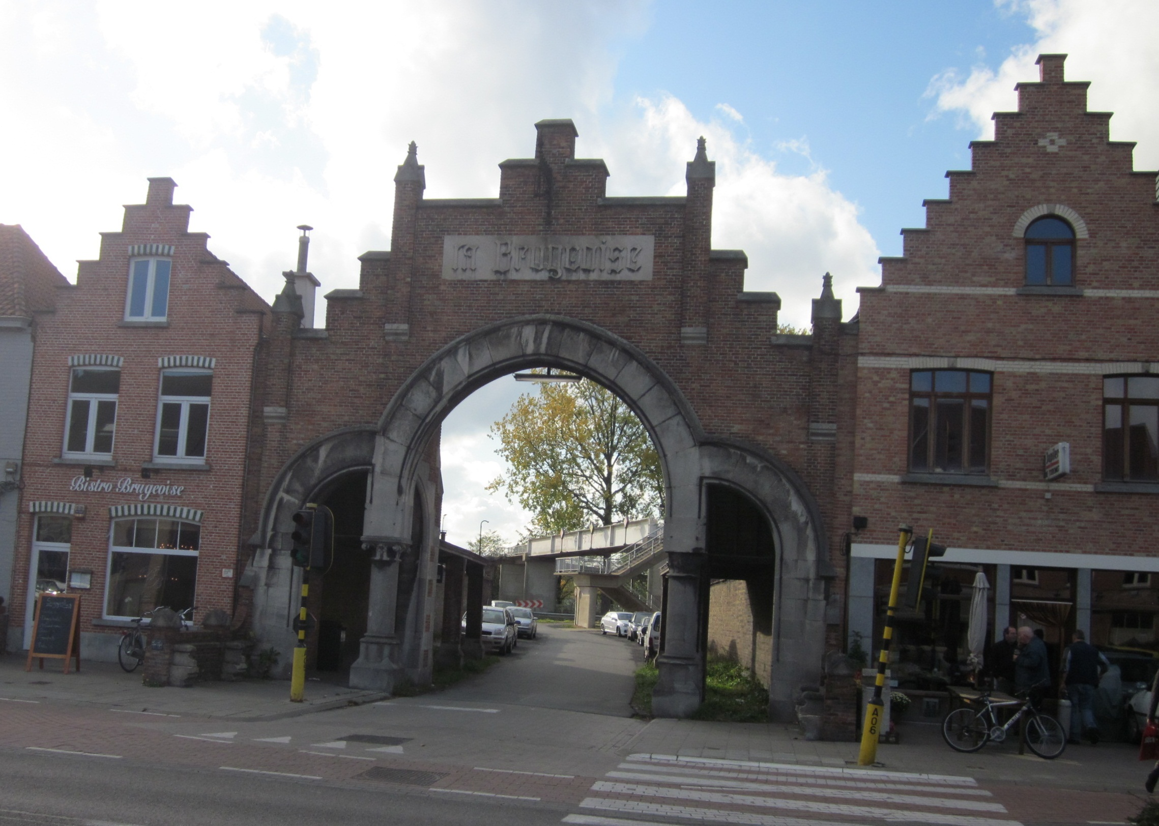 Poort die de fabriekstoegang was tot het staalconstructiebedrijf "La Brugeoise et Nivelles", Baron Ruzettelaan 140-144 Assebroek (Brugge). Twee cafés met trapgevels flankeren de poort. 21″ N, 3° 13′ 54.23″ E